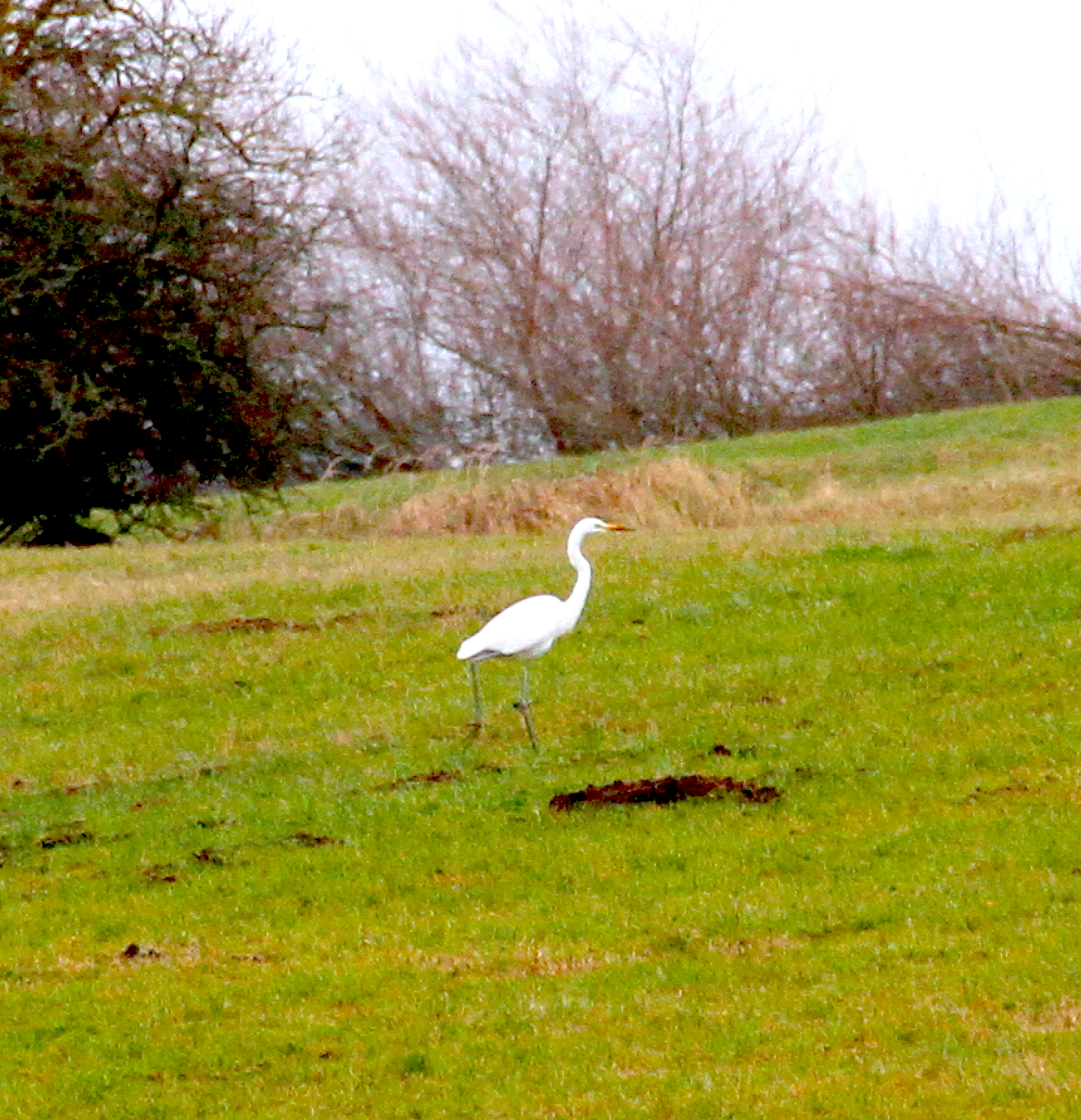 Silberreiher in Rückers (Flieden)